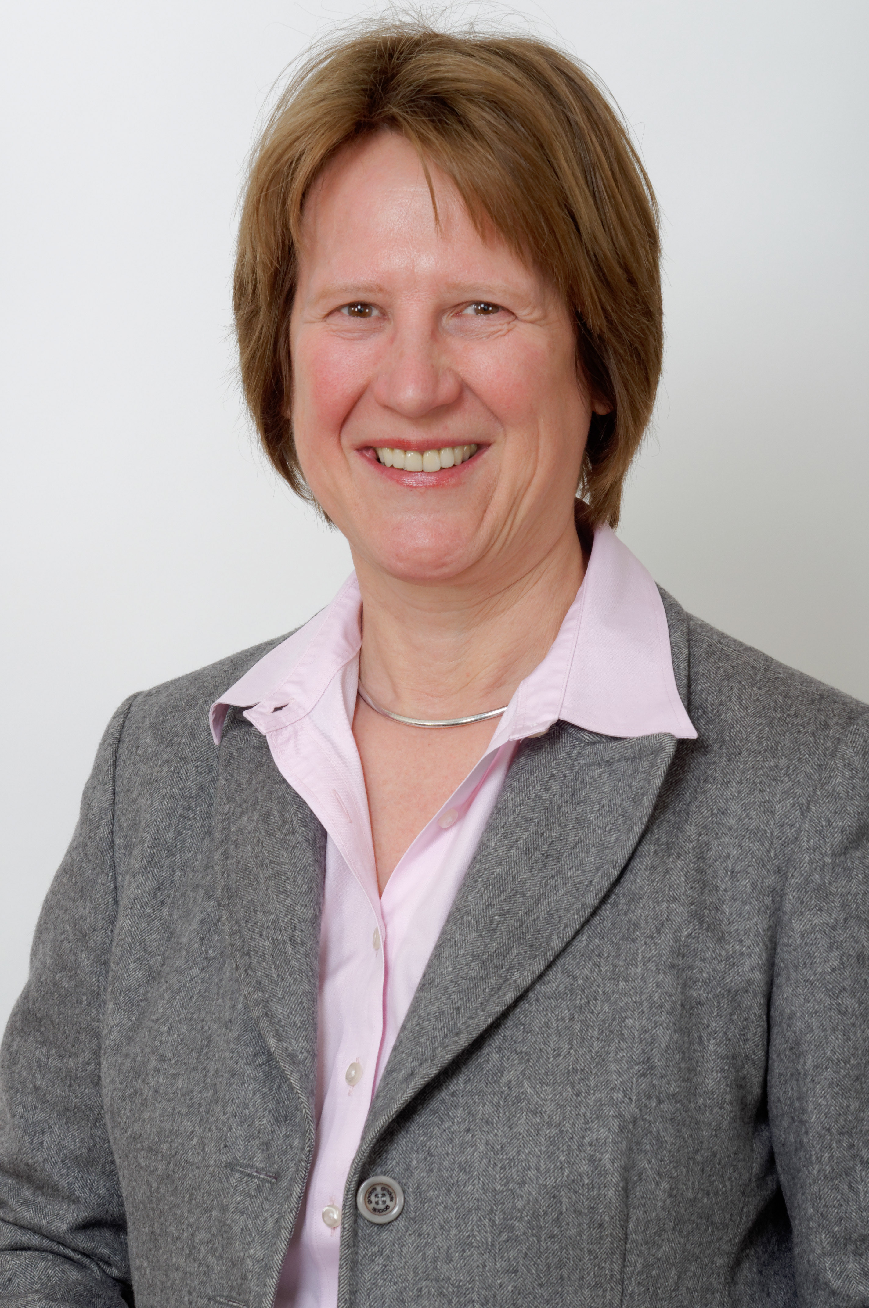 Landtagsprojekt Hessen